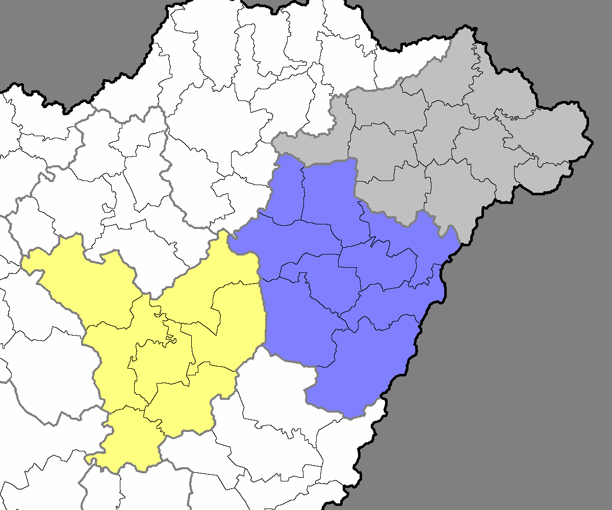 Az észak-alföldi régió kistérségei, 2007